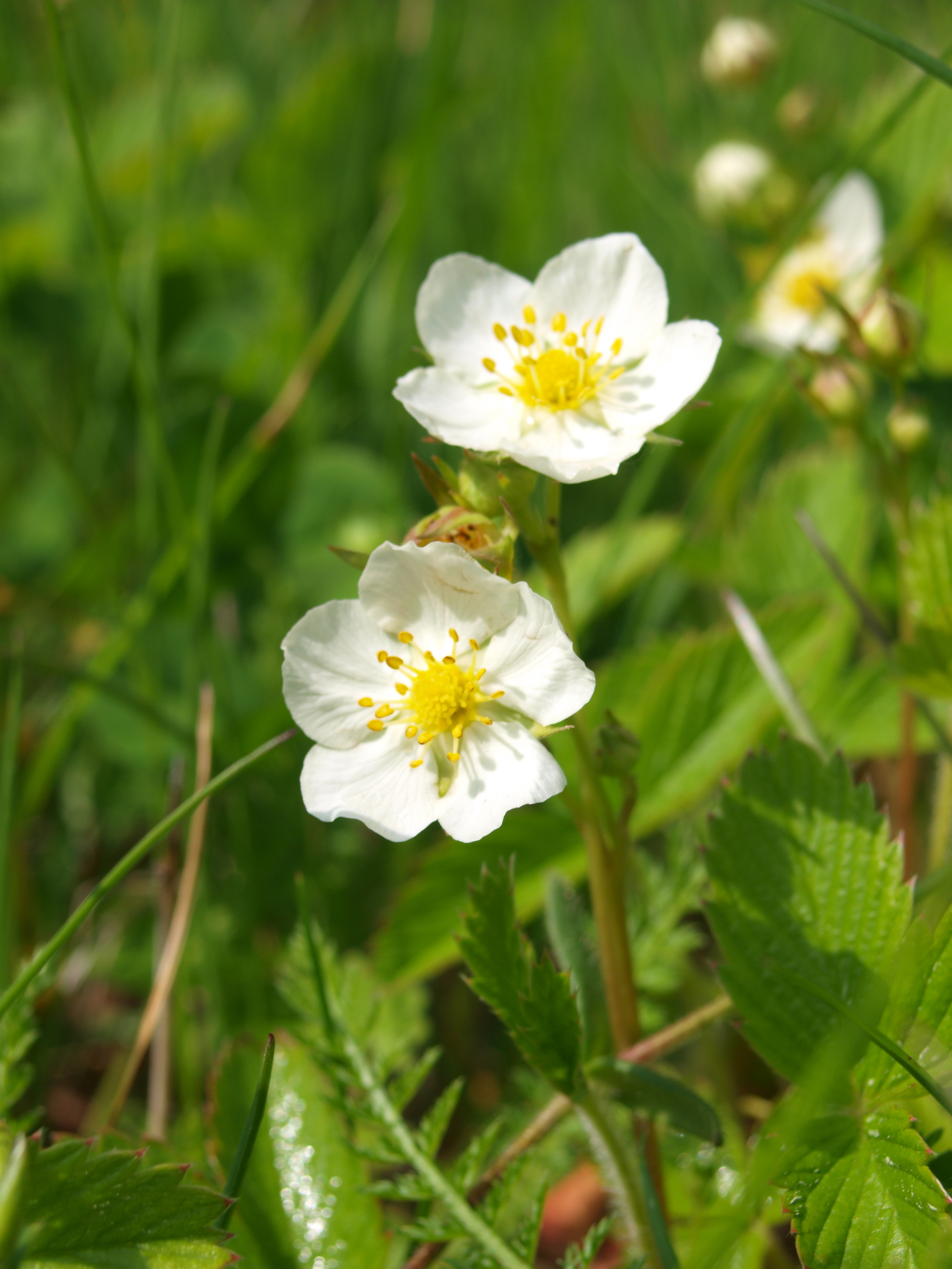 Pildil Fragaria vesca ehk metsmaasika õied